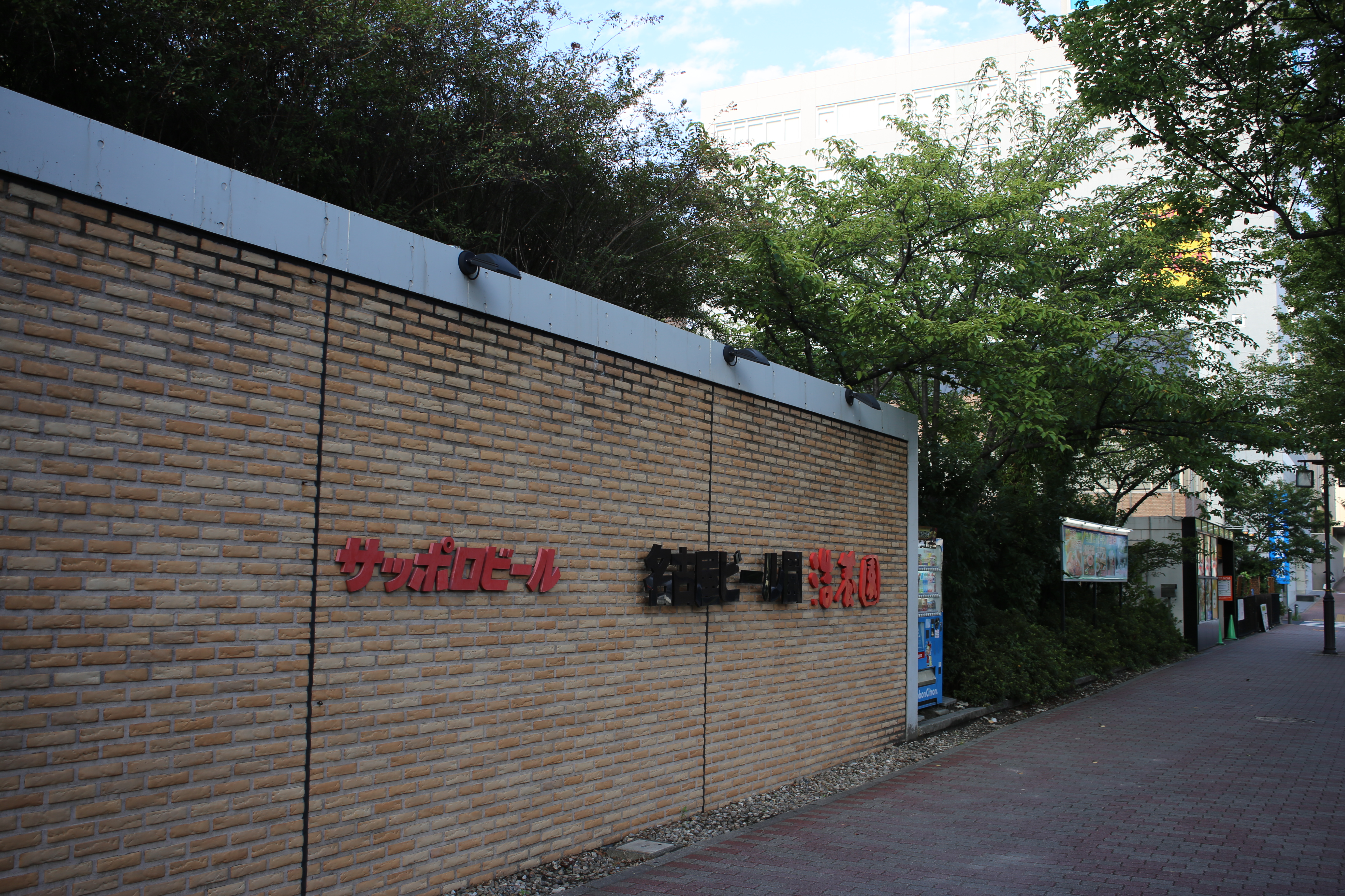 名古屋市千種区千種二丁目のサッポロビール名古屋ビール園浩養園を南側公道西側より撮影